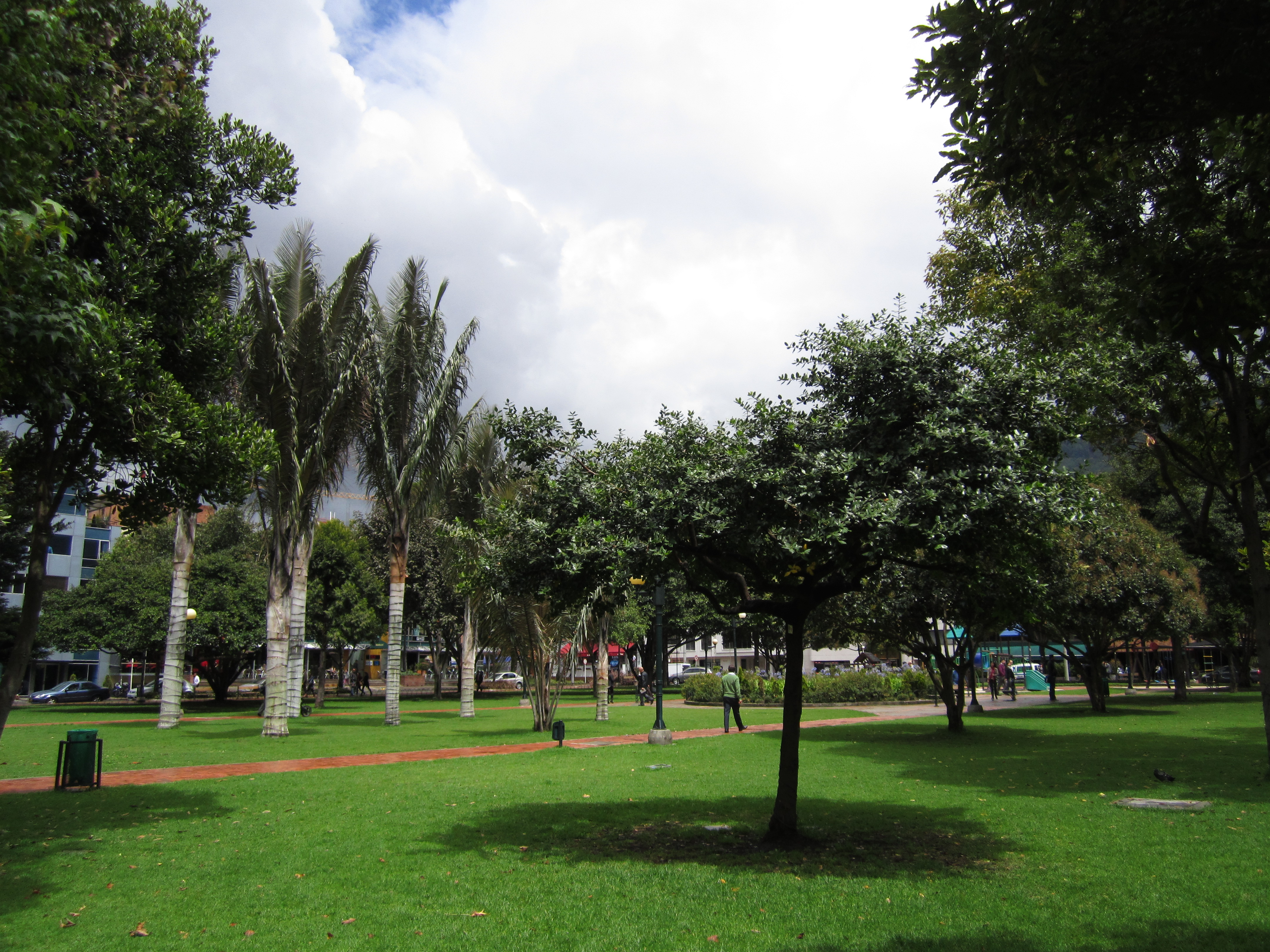 Bogotá, barrio Chicó. Parque de la calle 93.